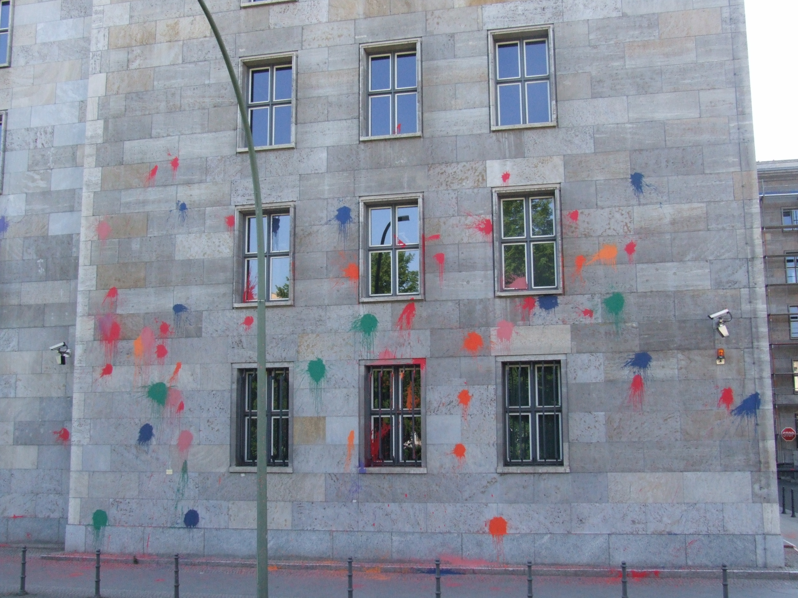 Finanzministerium nach der EuroMayDay-Demo am 1. Mai 2009